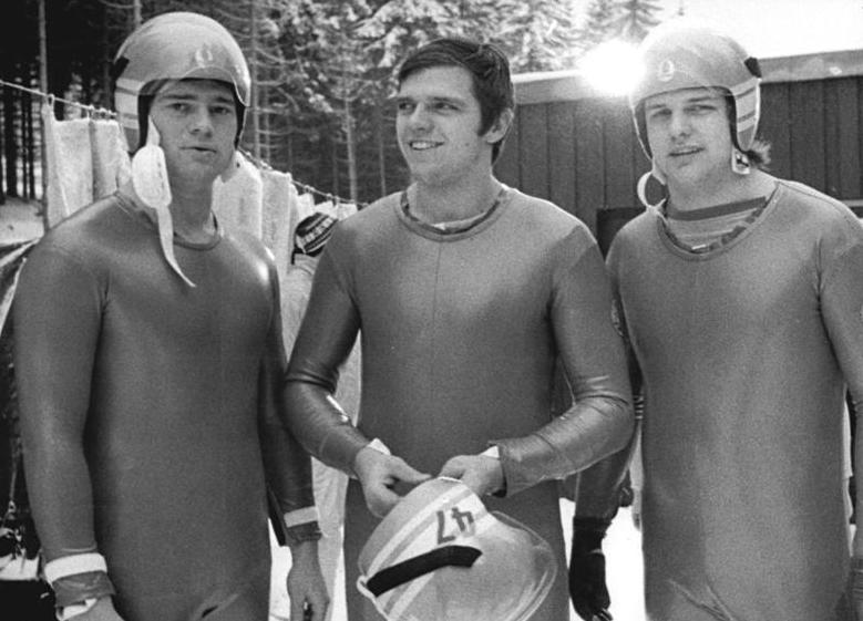 Hans Rinn, Detlev Günther, Bernhard Glass ADN-ZB Schaar 30.12.1977-Oberhof: Hans Rinn (M.) konnte am 30.12.1977 auf der Oberhofer Kunsteisbahn bei den 26. DDR-Meisterschaften im Rennschlittensport (in den Einsitzer Wettbewerben) seinen Titel erfolgreich verteidigen. 2. Detlev Günther (l.) und 3. Bernhard Glass (r.) (Vergl. ADN-Meldg. 095 v. 30.12.)